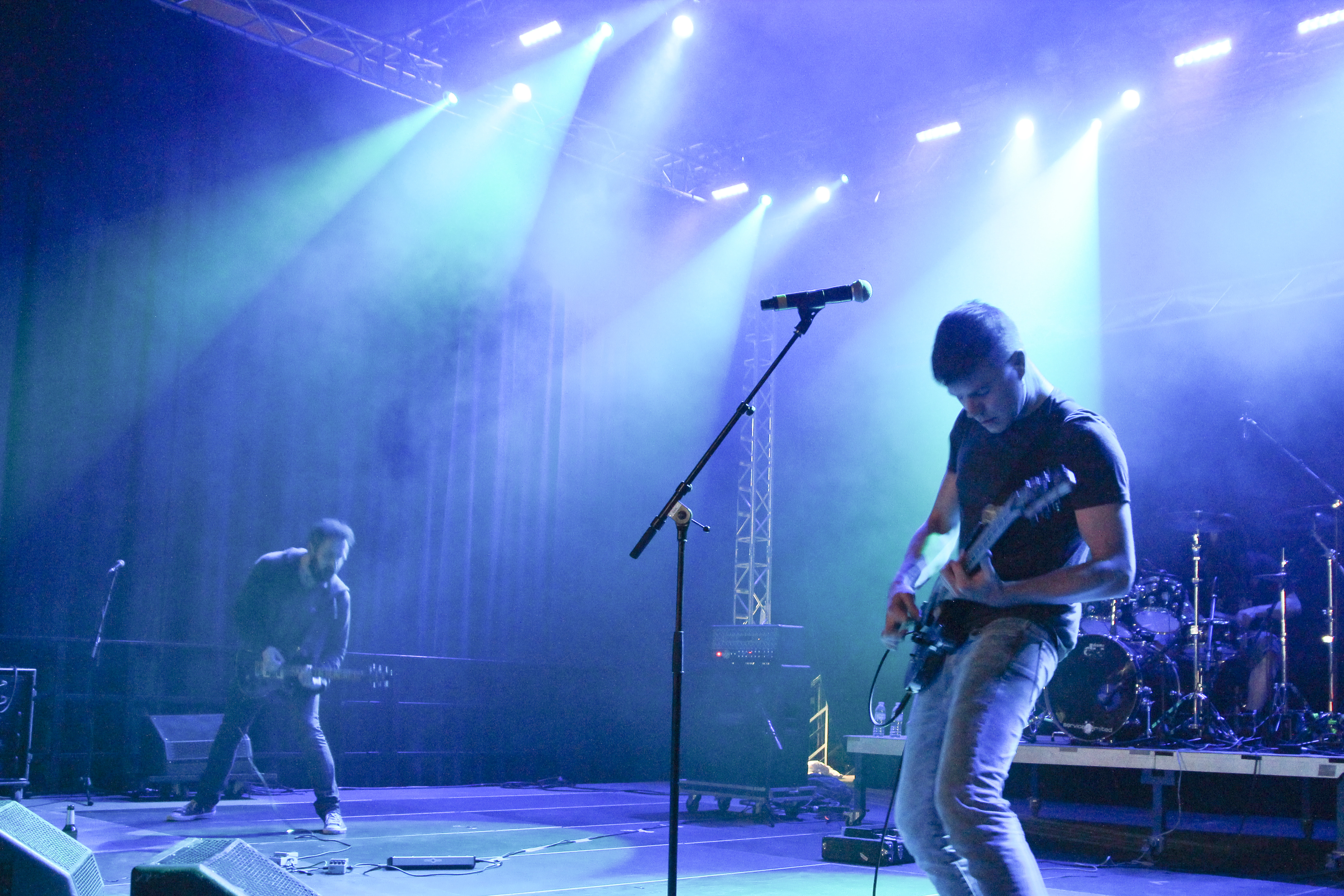 Altar of Plagues auf dem Wave-Gotik-Treffen 2013 in Leipzig, Kohlrabizirkus.